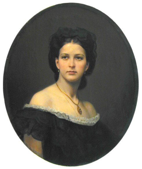 Графиня Софья Алексеевна Бобринская (1842-1871), ур. Шереметева. Жена графа Алексея Васильевича Бобринского (1831-1888).